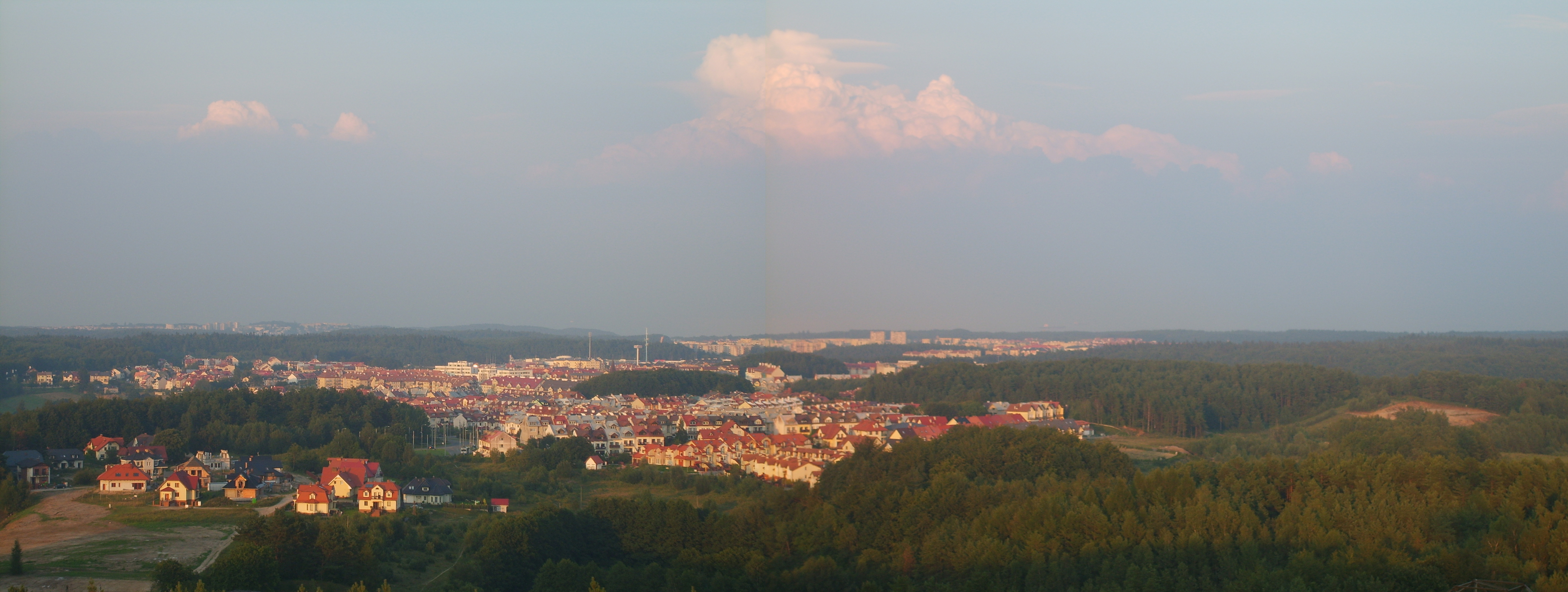 Góra Donas, widok z wieży na wschód, w kierunku Gdyni Dąbrowy.